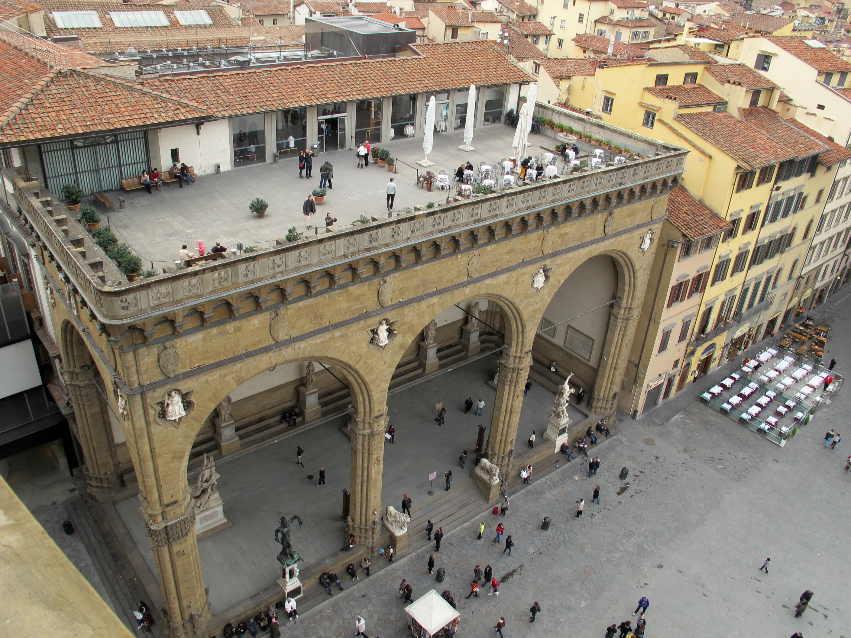 Torre di arnolfo, veduta loggia dei lanzi31